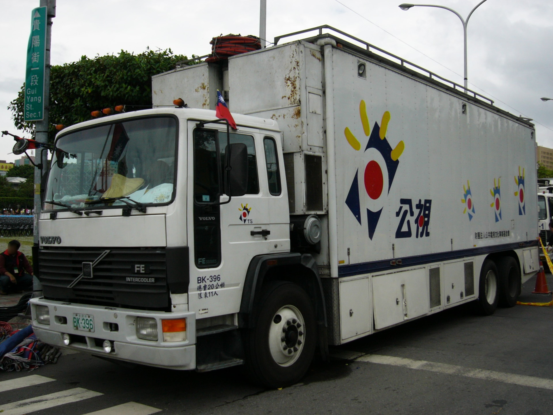 公共電視文化事業基金會大轉播車BK-396左前方外觀